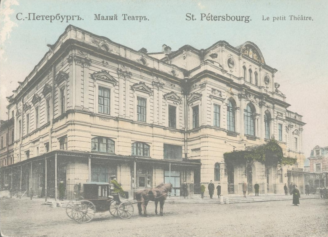 Малый театр в Санкт-Петербурге.